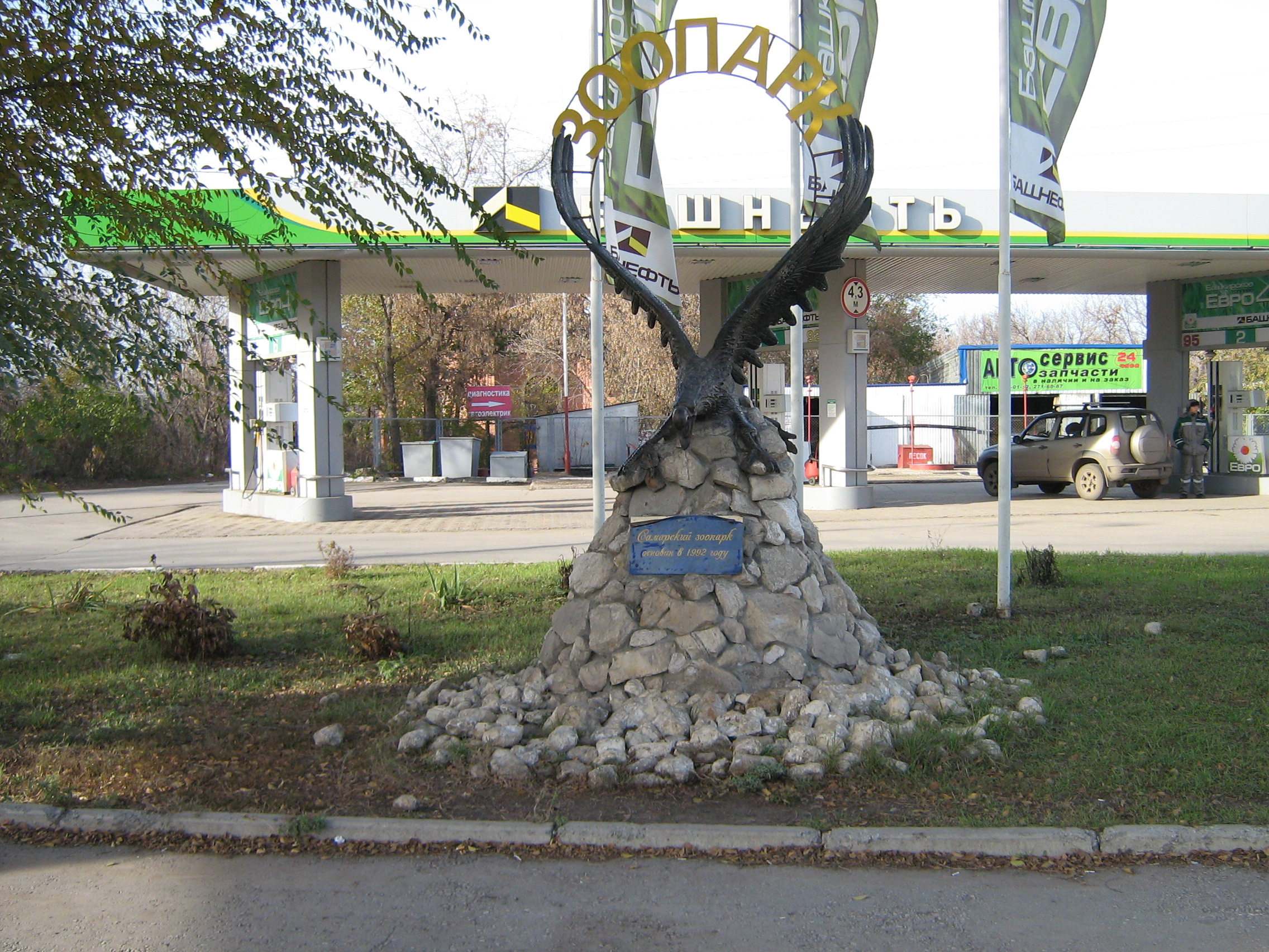 Вывеска "Самарский зоопарк"